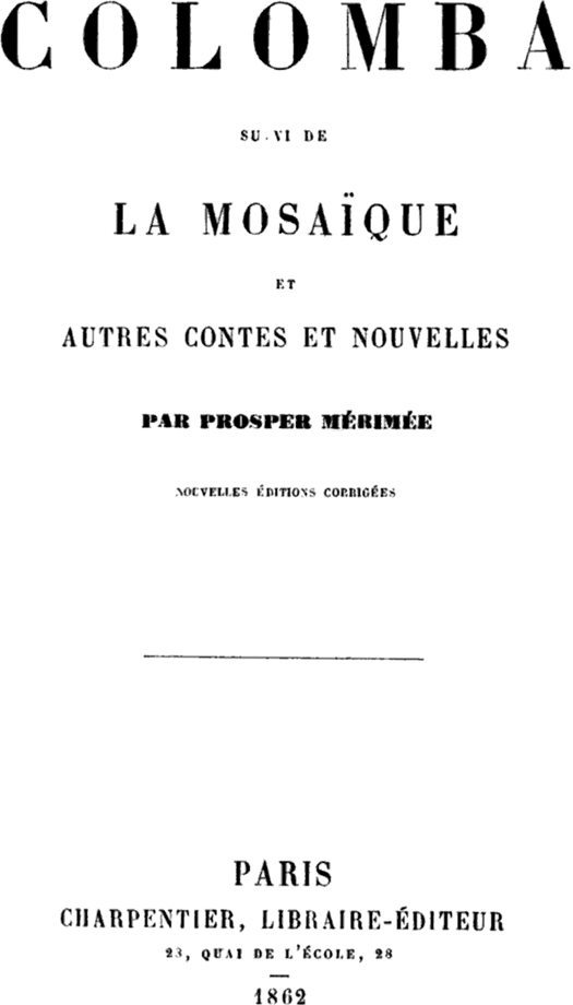 Title page from Colomba (1840) by Prosper Mérimée (1803-1870)